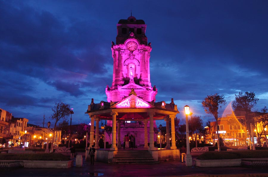 Reloj Monumental de Pachuca, iluminada por la noche de color rosa, devido a una campaña contra el cancer.